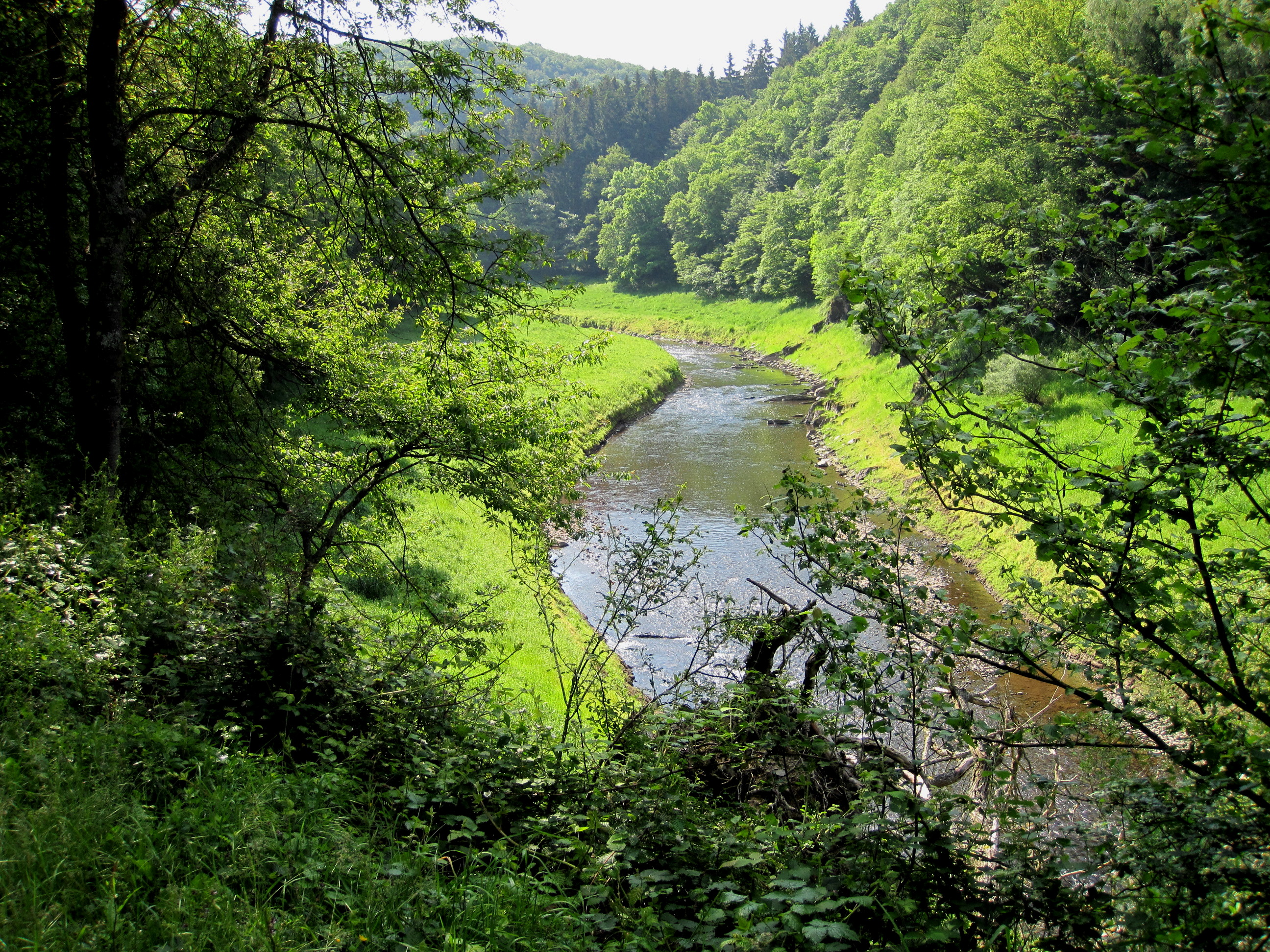 Urft nahe Victor-Neels-Brücke im Nationalpark Eifel